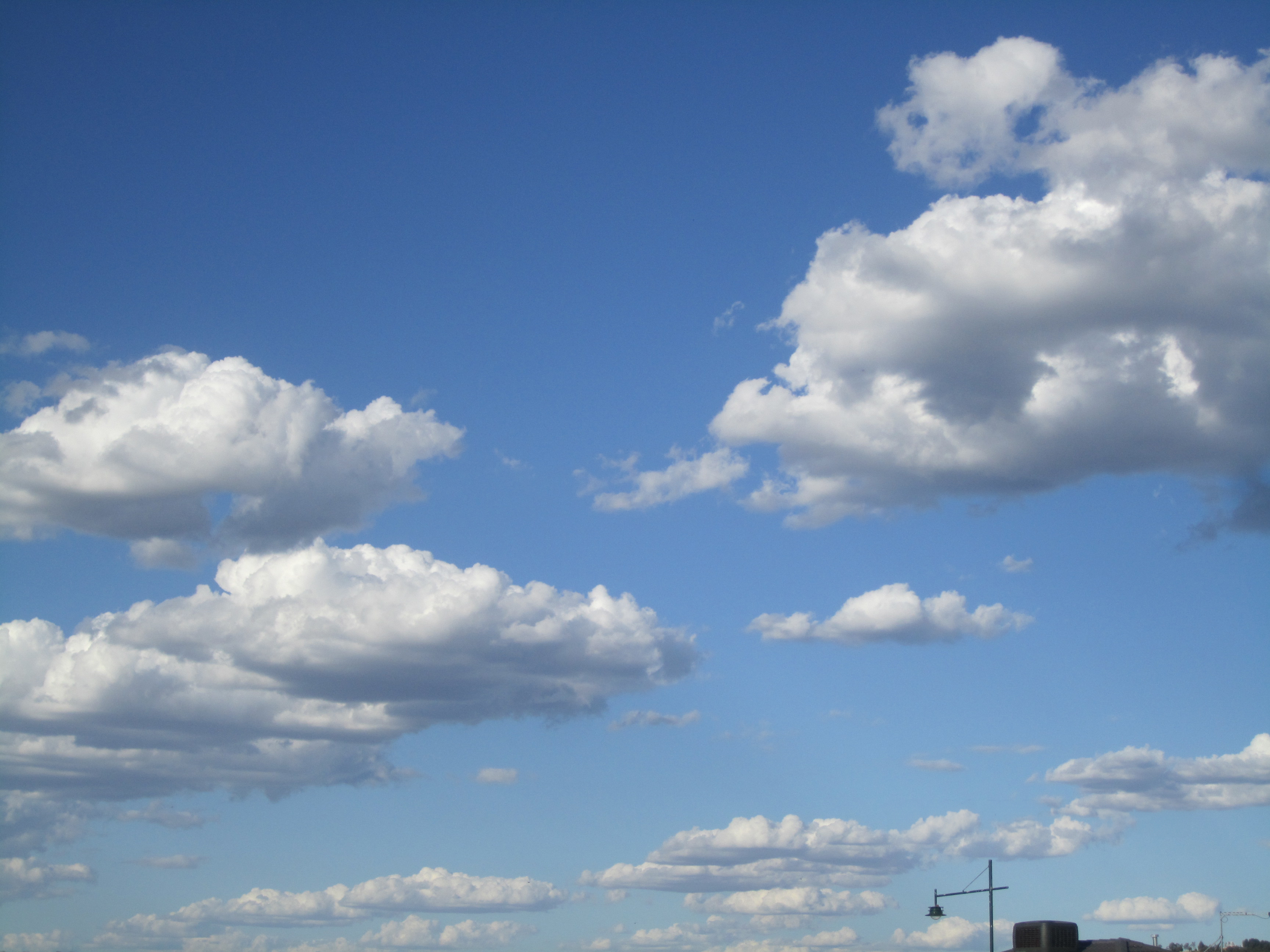 Clouds in Victoria's sky in January